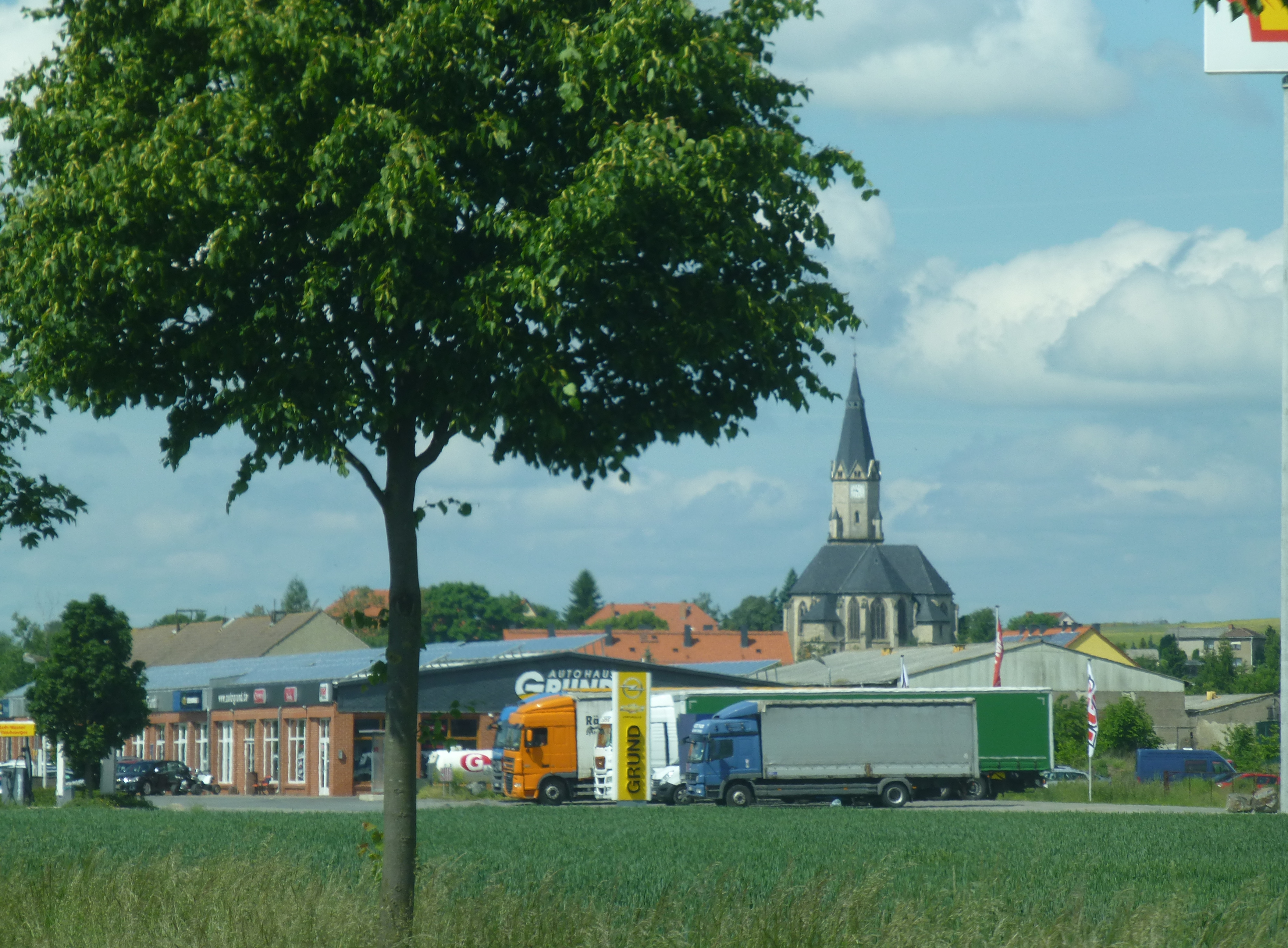 Ansicht von Berga mit Kirche